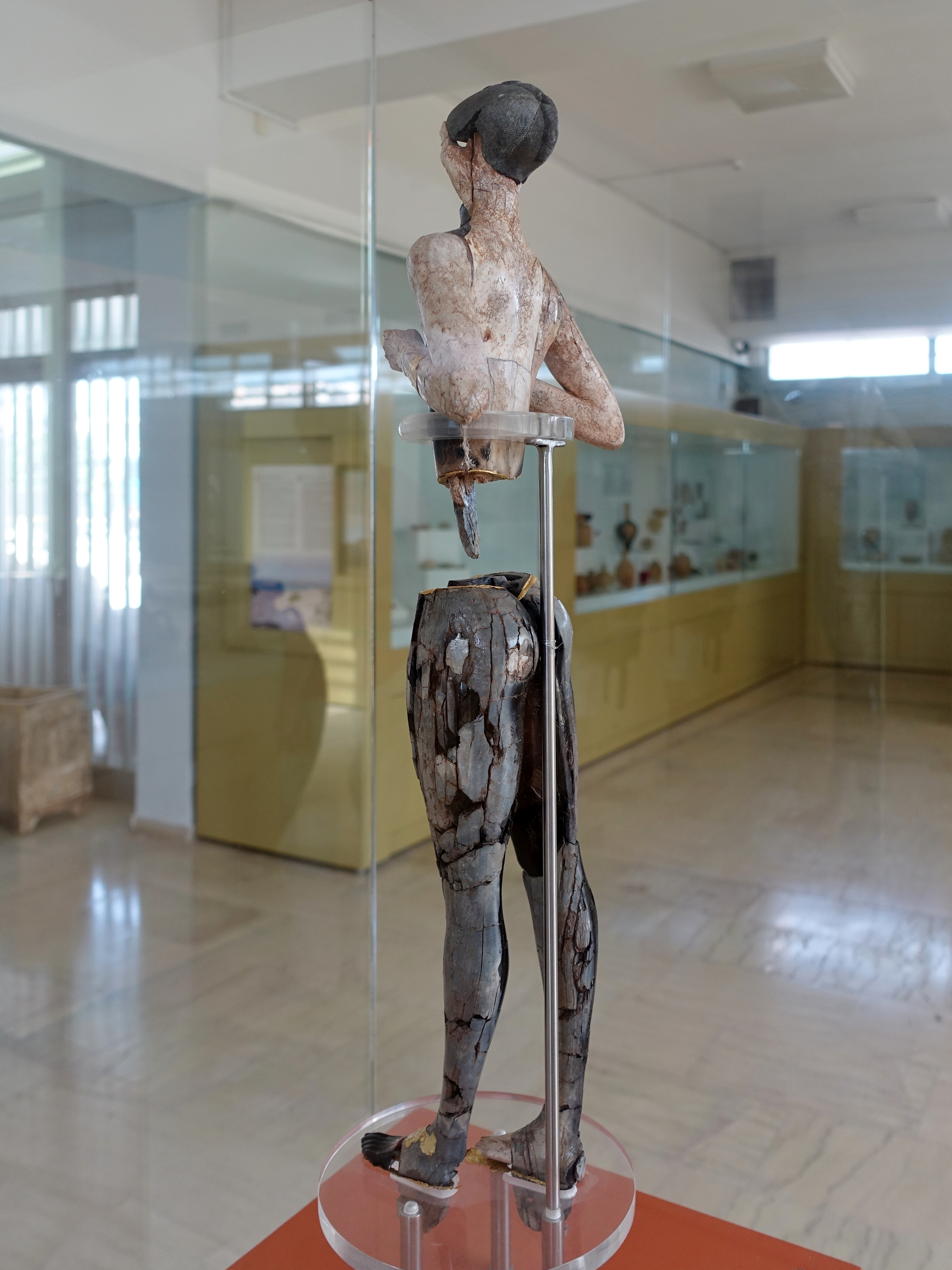 Kouros von Palaikastro (1480–1425 v. Chr.), minoische Götterstatue aus Haus 5 der Ausgrabungsstätte von Roussolakkos, Archäologisches Museum von Sitia, Kreta, Griechenland